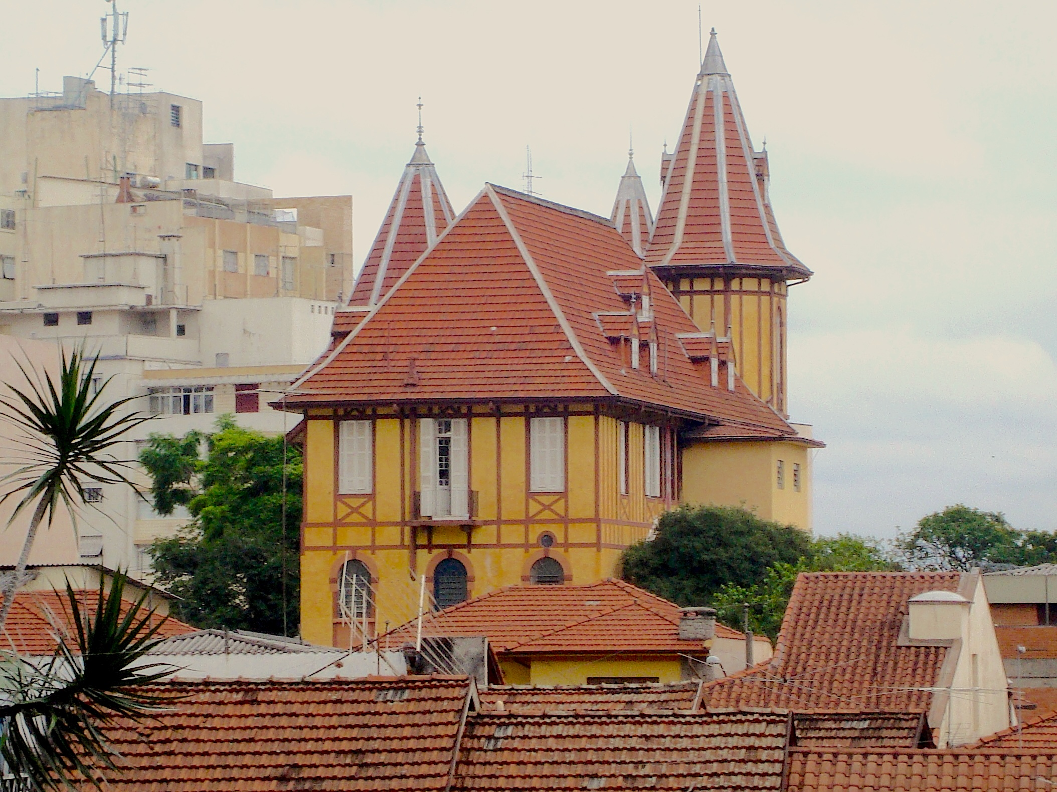 Palacete Baruel no Alto de Santana, zona norte de São Paulo. Visto da mesma região.